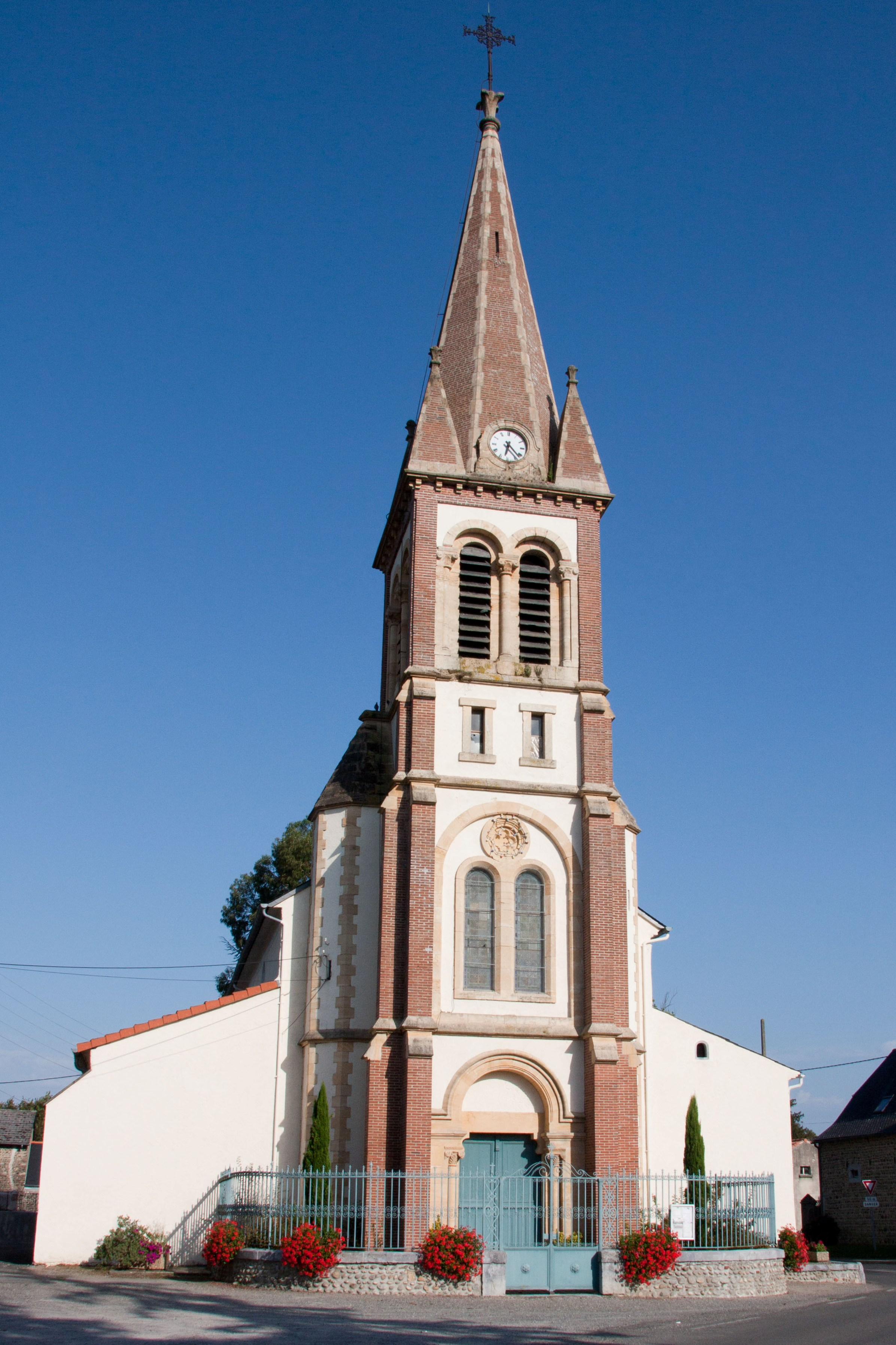 Église d'Oursbelille / Oursbelille / Hautes-Pyrénées / France